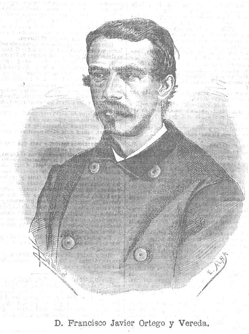 Retrato de Francisco Ortego y Vereda, en periódico español El Globo.